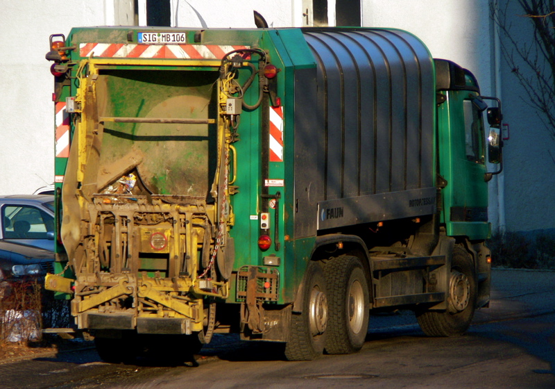 Müllauto in Bad Saulgau (Faun Rotopress)